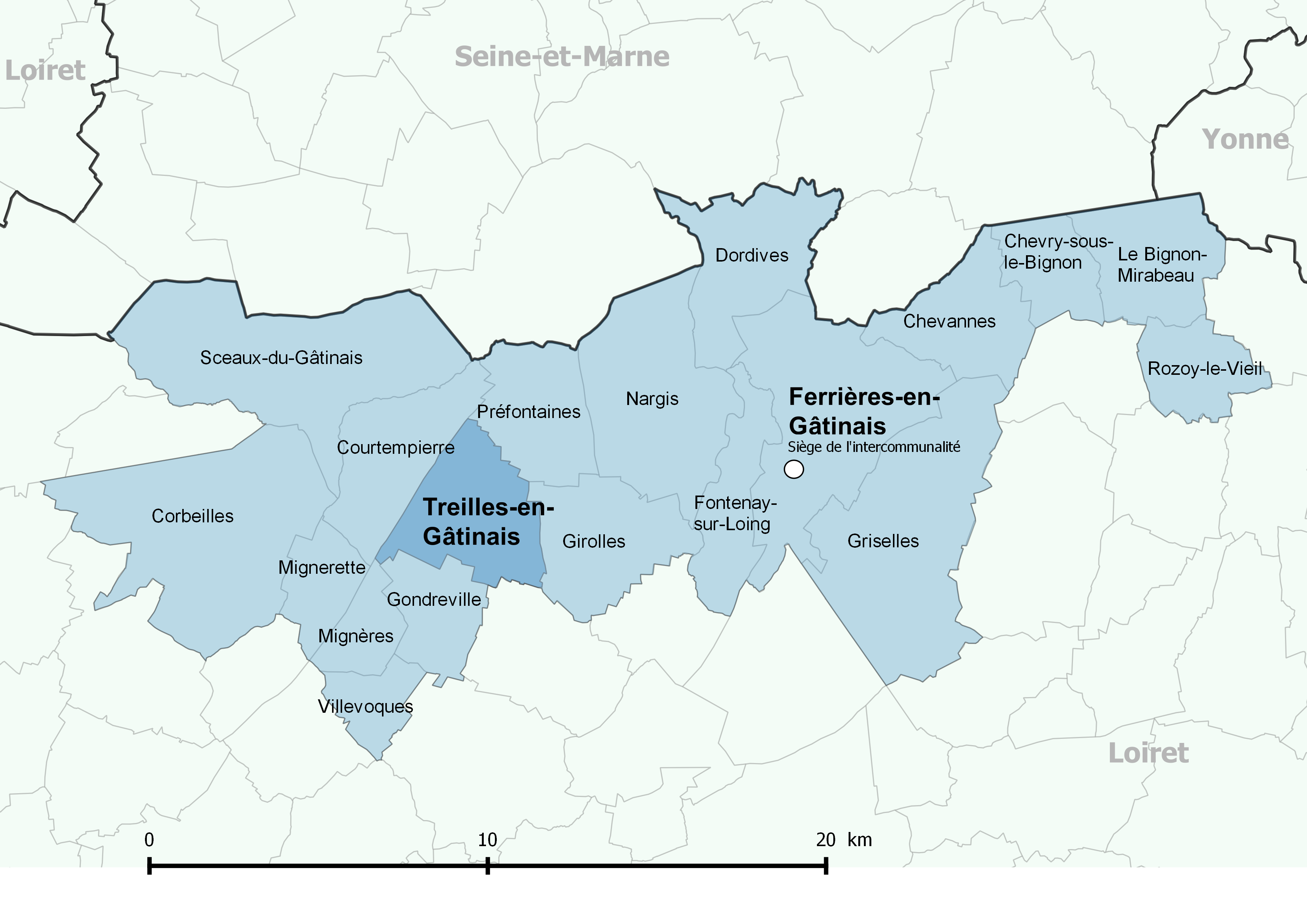 Périmètre de la communauté de communes des Quatre Vallées (Loiret) - Positionnement de la commune de Treilles-en-Gâtinais.